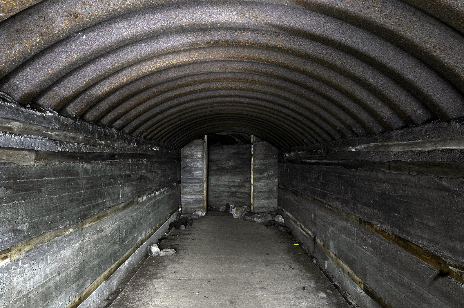 Underjordisk bunker ved Justøya kystfort